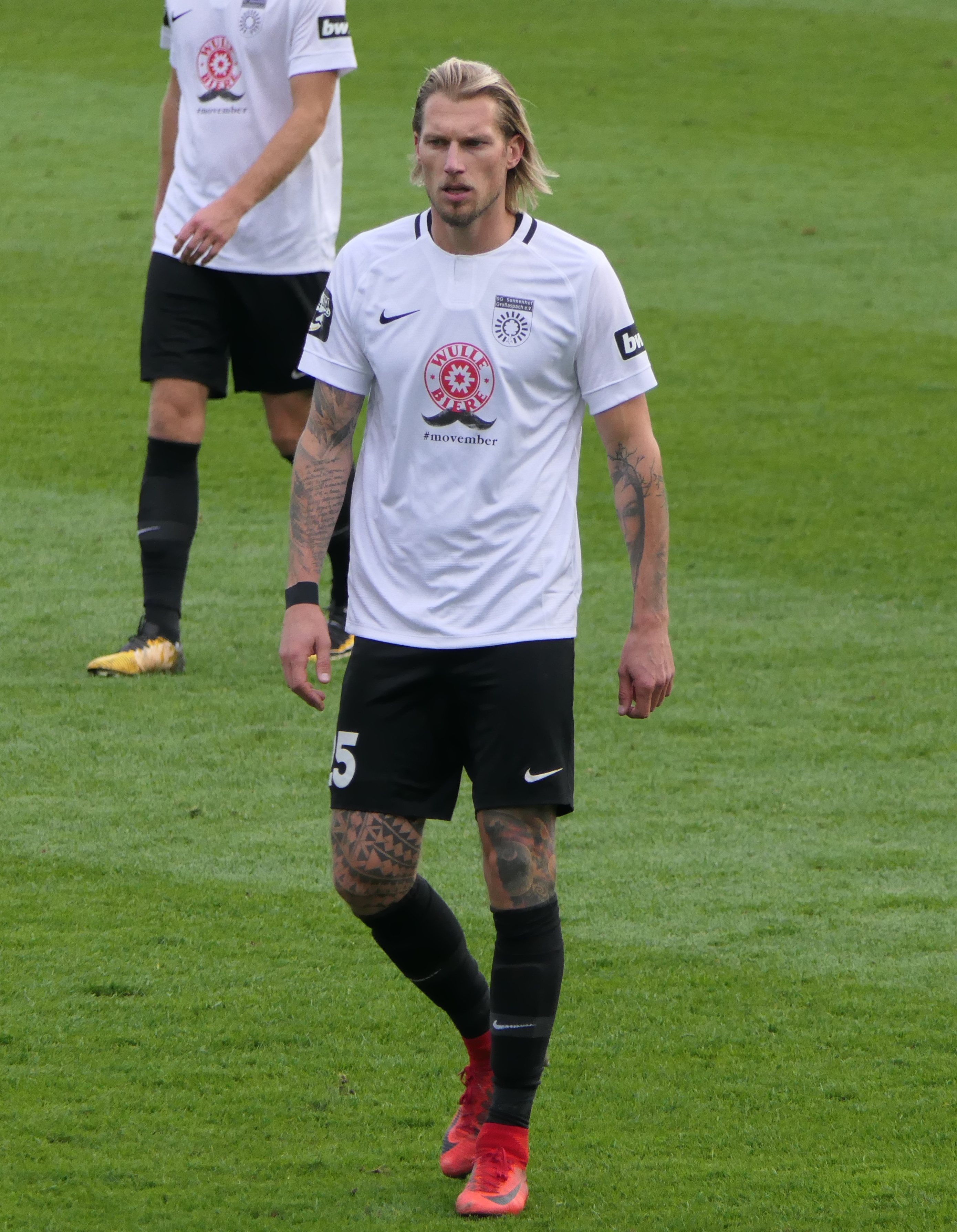 Der Fussballprofi Kai Gehring im Trikot der SG Sonnenhof Großaspach beim Heimspiel gegen Eintracht Braunschweig am 03.11.2018.